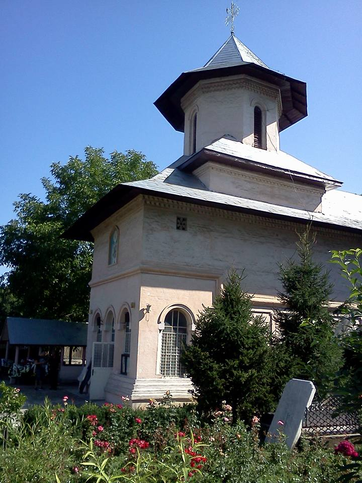 Biserica „Sf. Nicolae”-Vechi 01